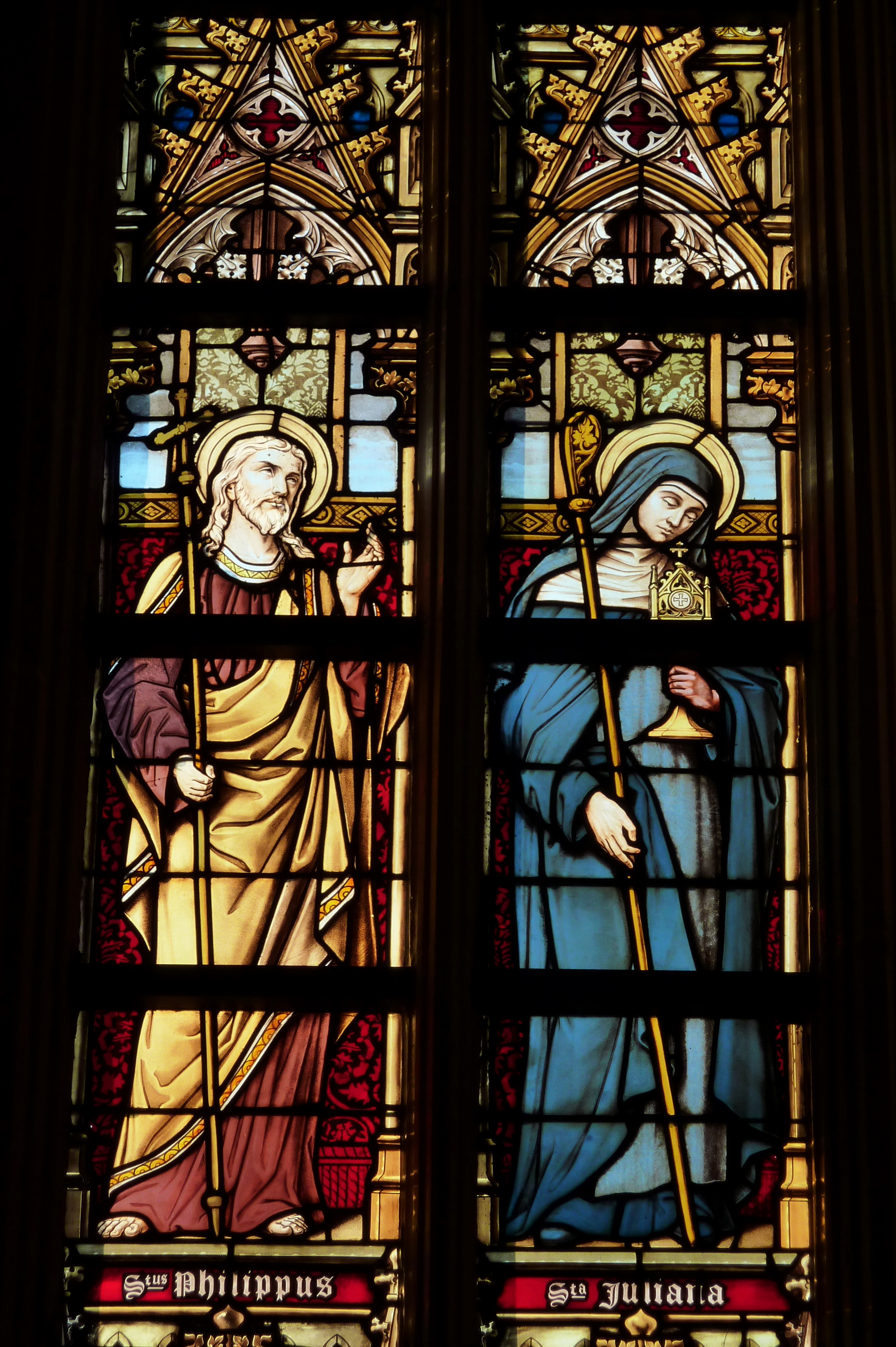 Bleiglasfenster in der Liebfrauenbasilika in Tongeren in der Provinz Limburg (Belgien) mit der Darstellung des Herzenstausches; Ausschnitt (links): Apostel Philippus, hl. Juliana